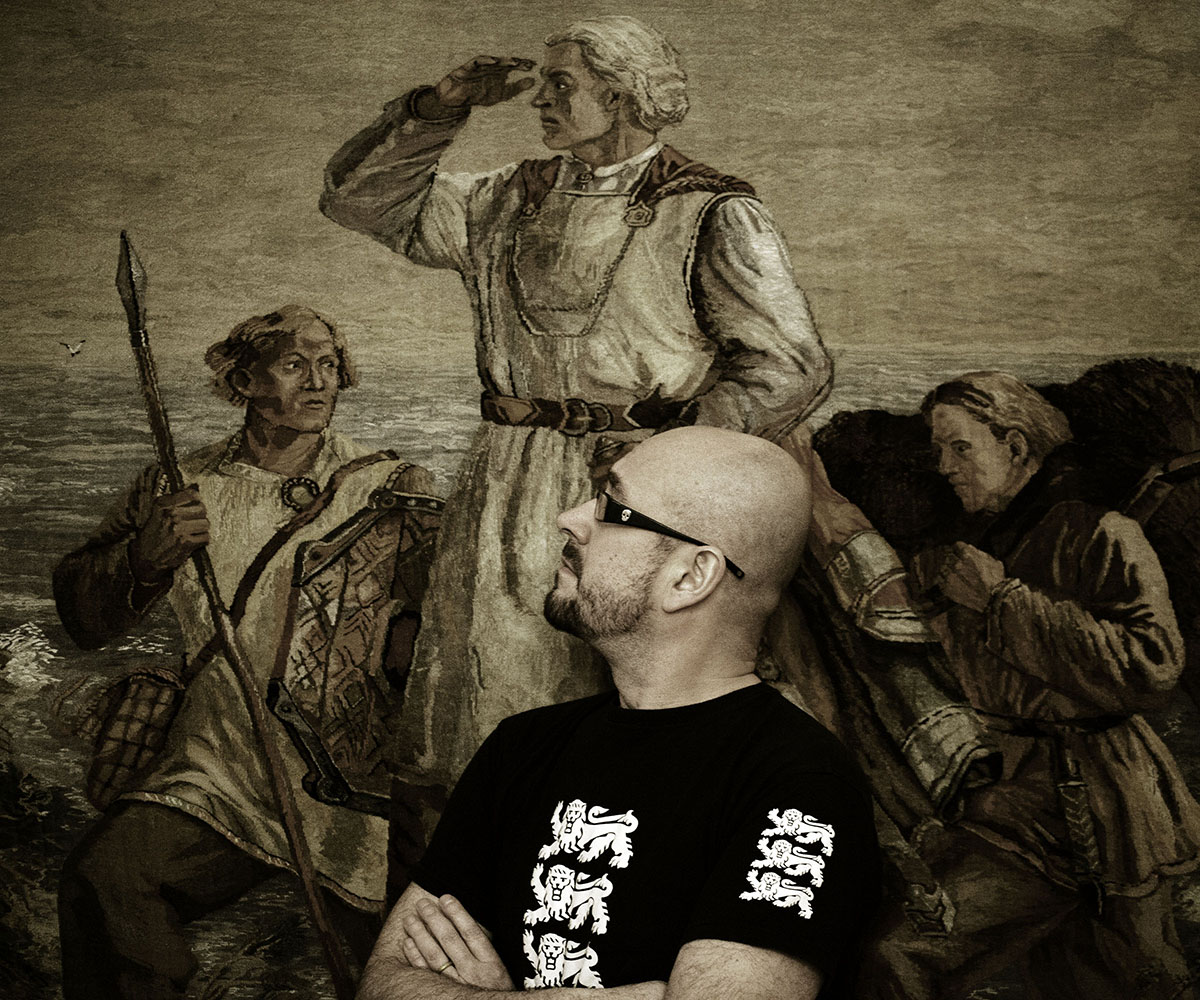 Asko Künnap